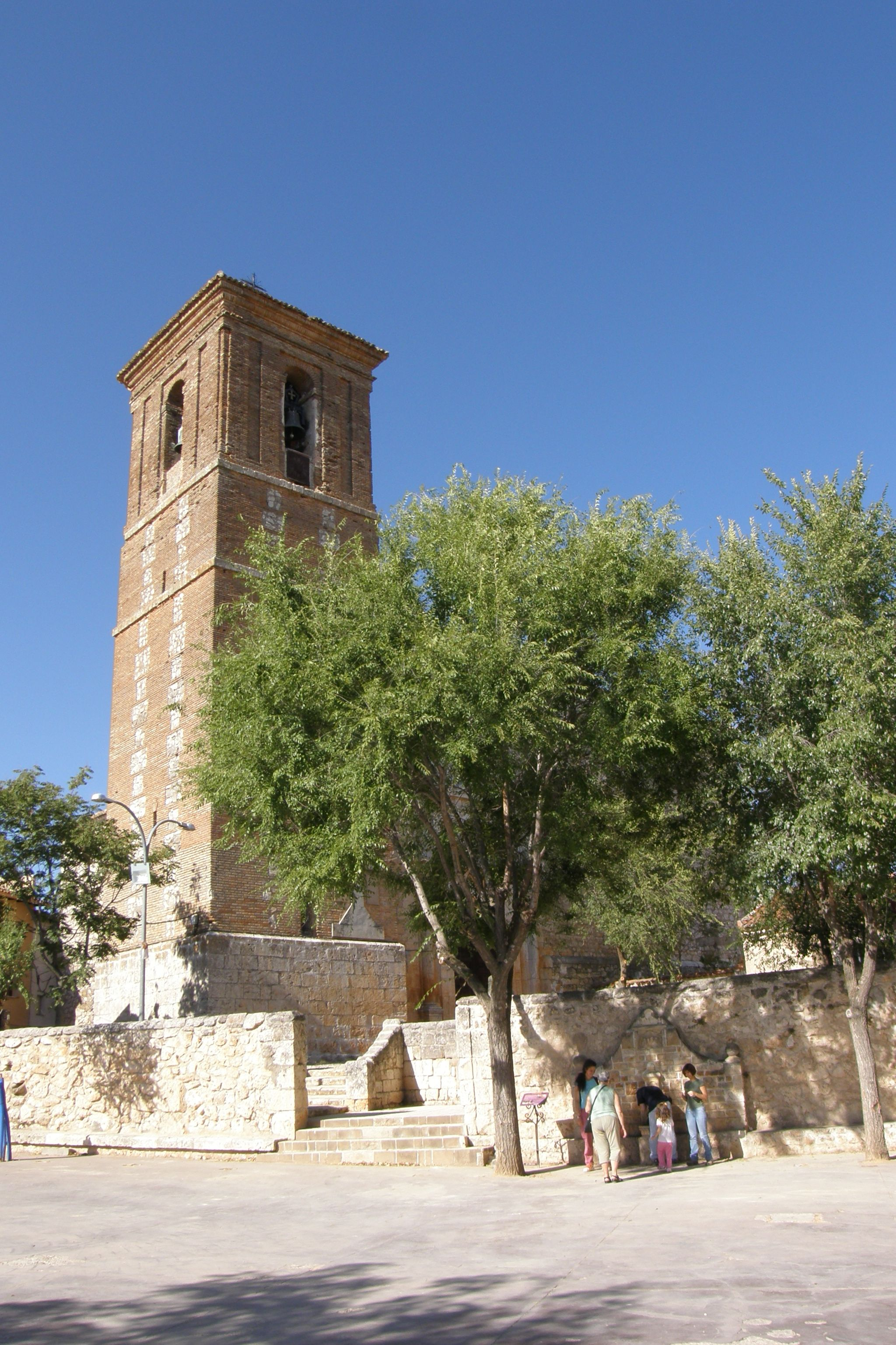 Plaza y torre de la Iglesia